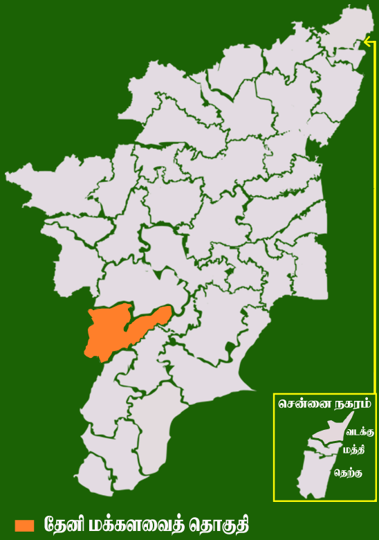 தமிழக வரைபடத்தில் உள்ள தேனி மக்களவைத் தொகுதி